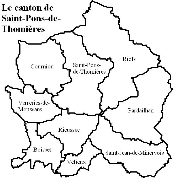 Le canton de Saint Pons de Thomières Image personnelle